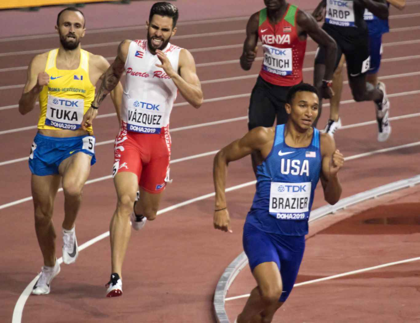 DOH50247 800m men final brazier tuka vazquez